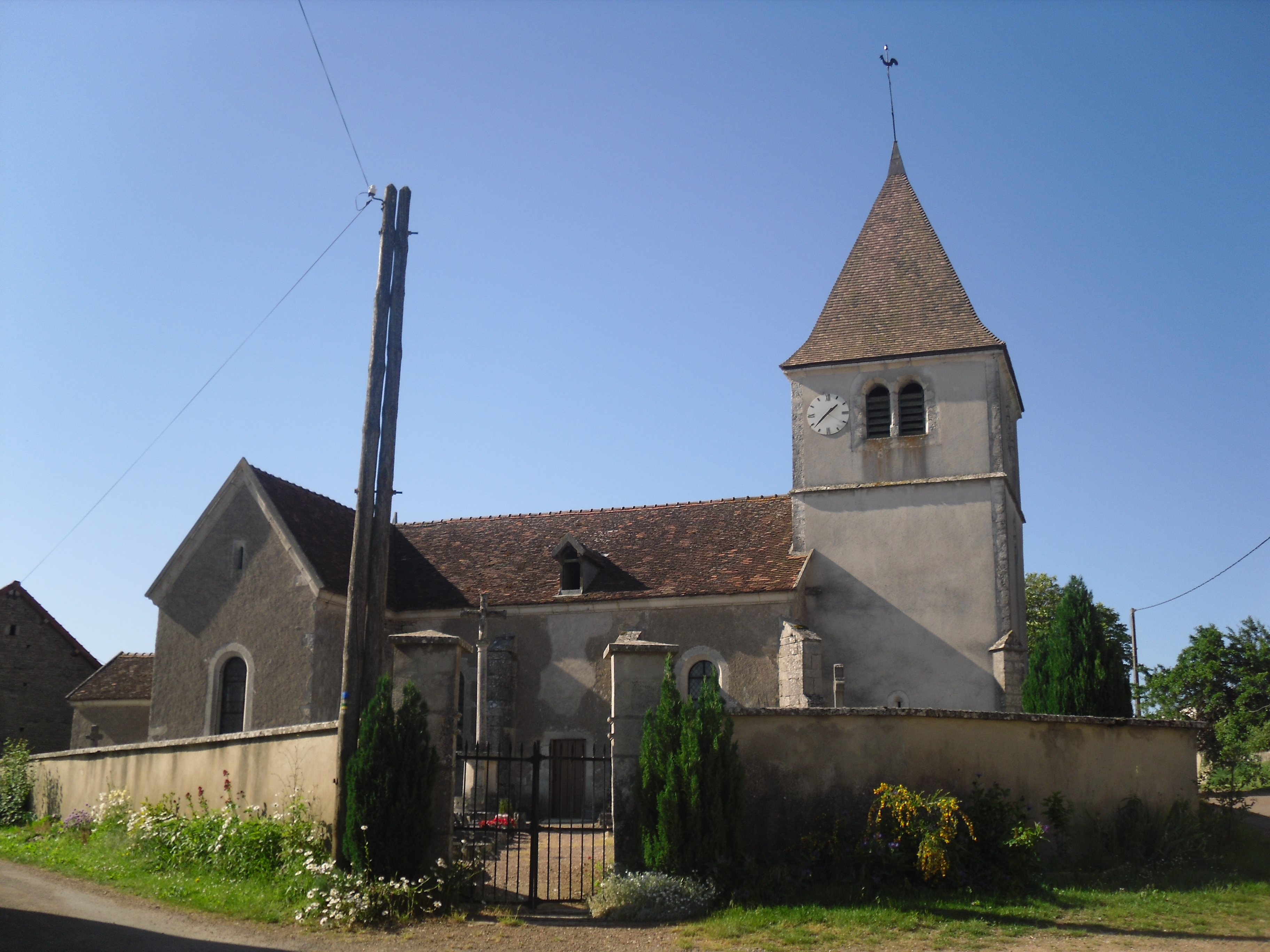 L'eglise